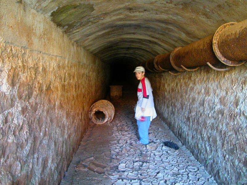 Minas de Uixan y Setolazar (11)